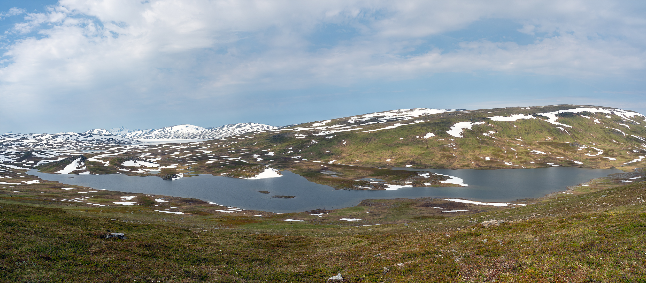 Ábmeljávrre - vy mot väster.